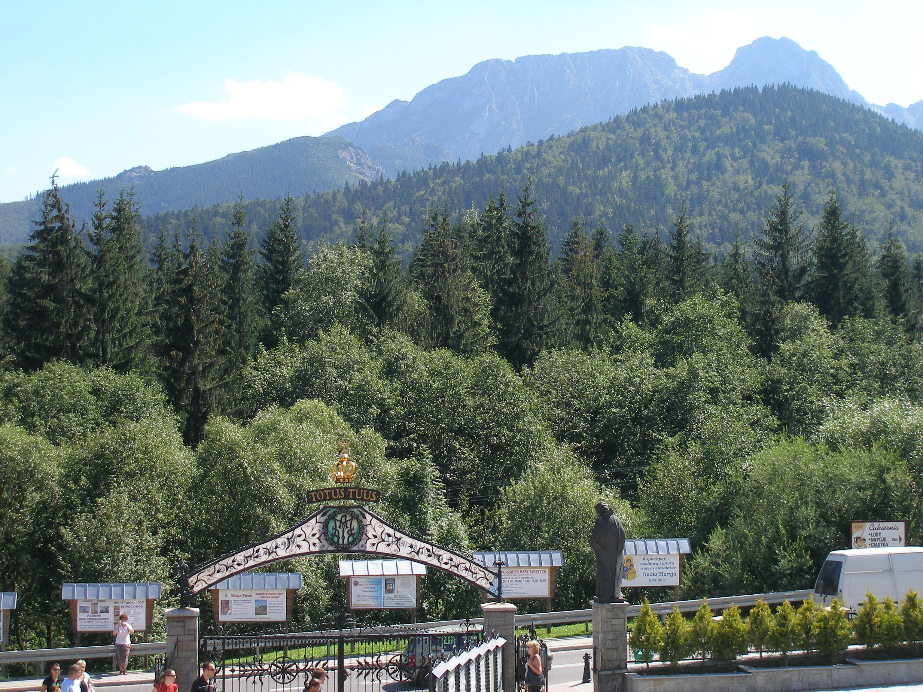 Sanktuarium "Matki Božej Fatimskej" v Zakopanom časť Krzeptówki.Kostol bol vysvätený v roku 1992. Pohľad na poľskú časť Vysokých Tatier.Spiaci mních.